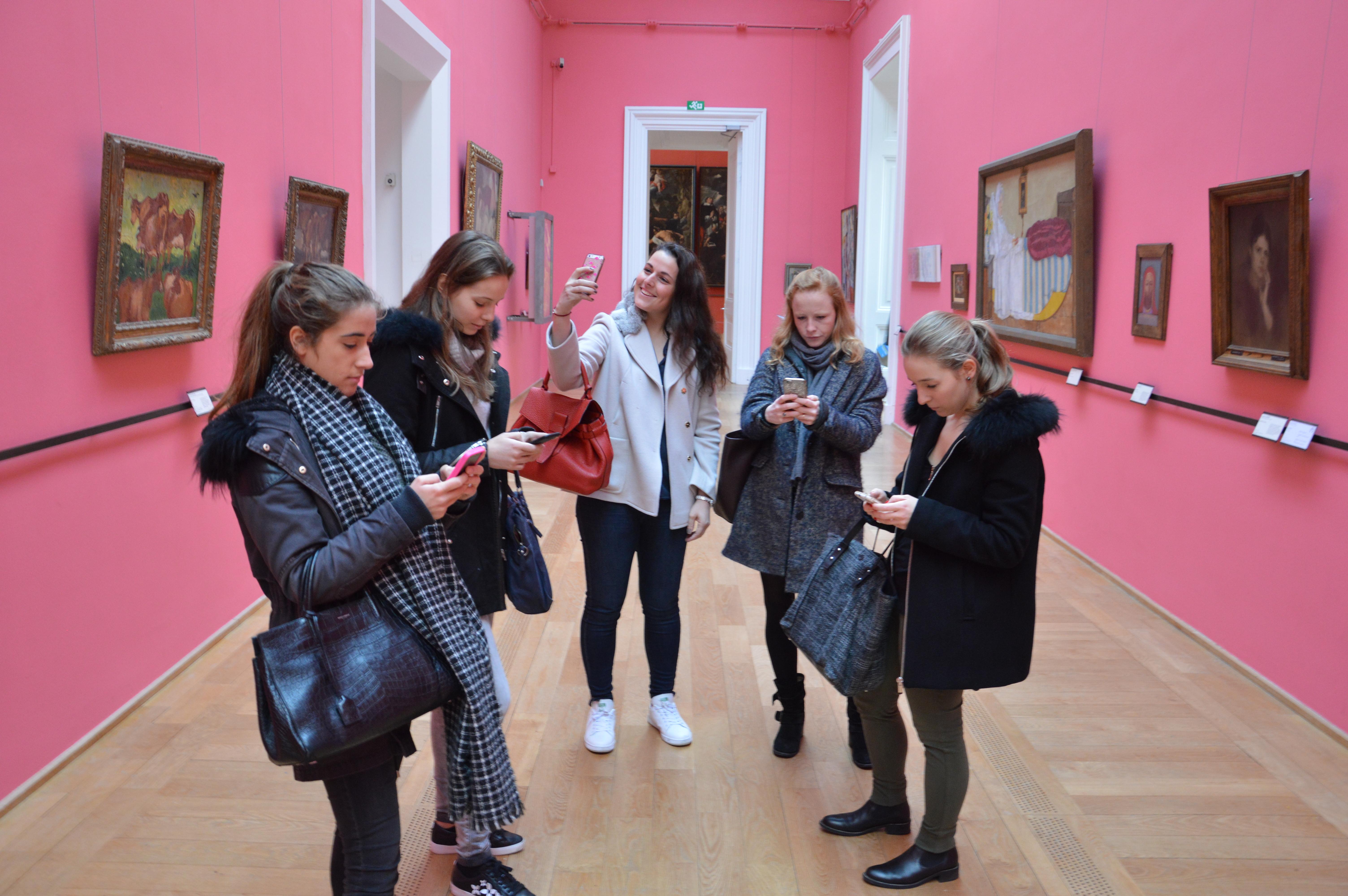 Jeunes filles de la générations Z en train d'envoyer des photos